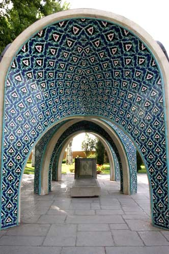 Kamal-o-molk tomb, (in Persian آرامگاه کمال‌الملک) — Neishapur.